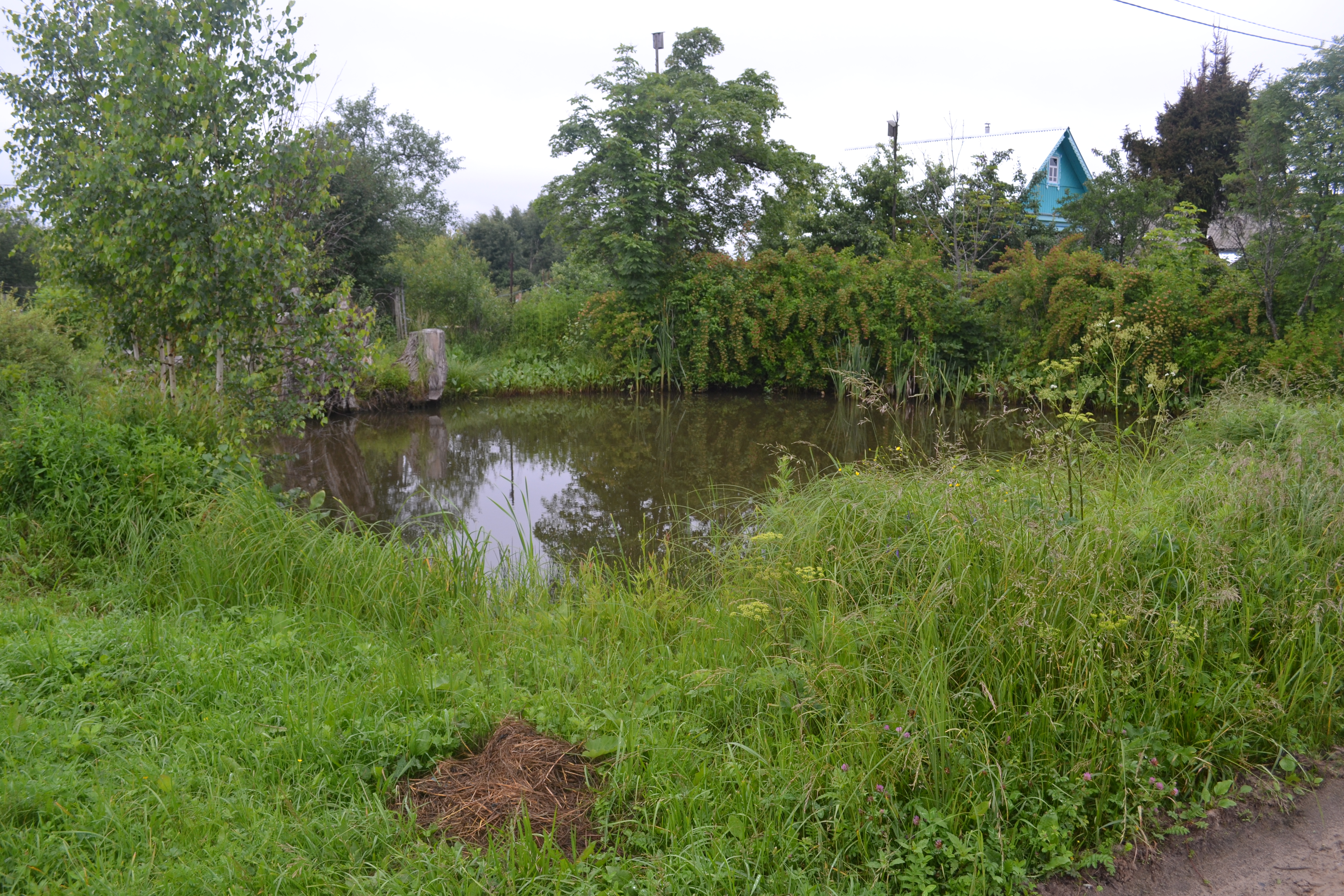 Пруд в деревне Демино (Шатурский район) 2